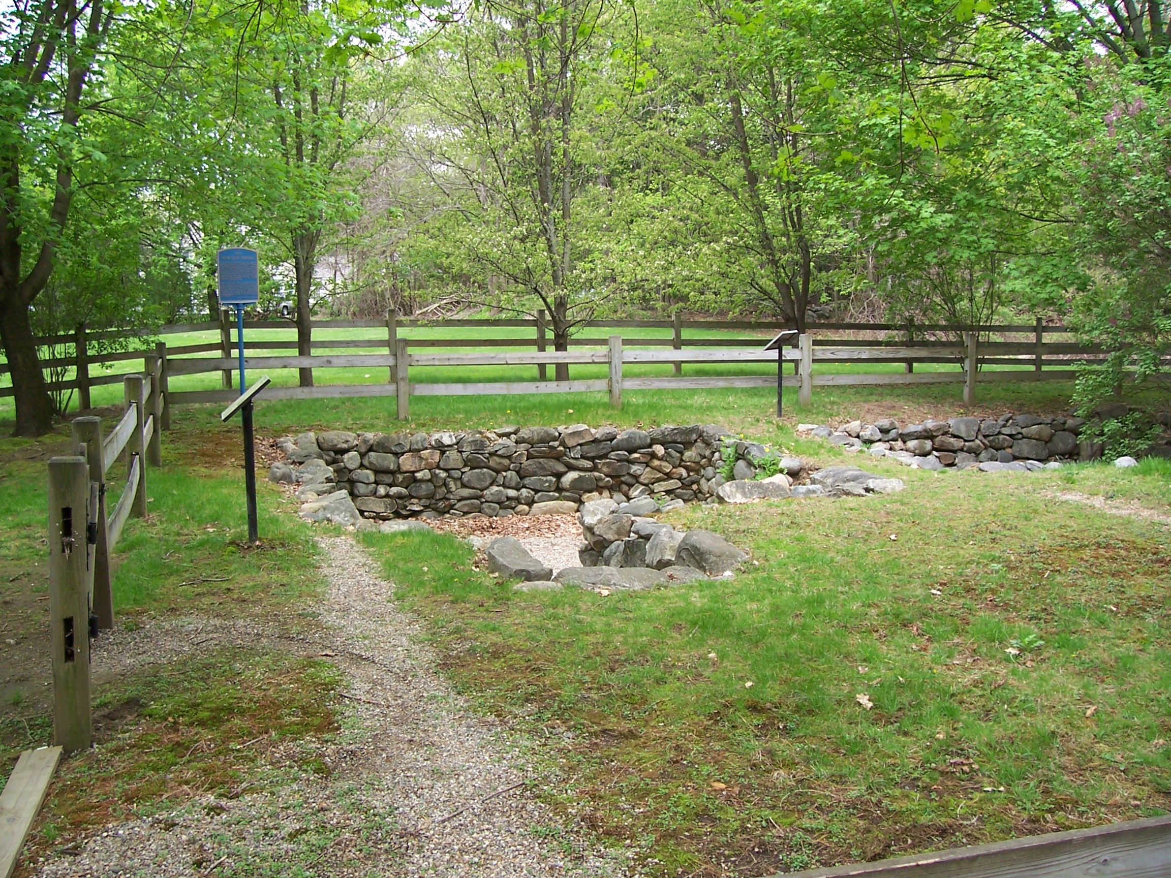 Derzeitiger Ausgrabungszustand des ehemaligen Pfarrhauses in Danvers, Mass. Mai 2006, Matthias Schönhofer